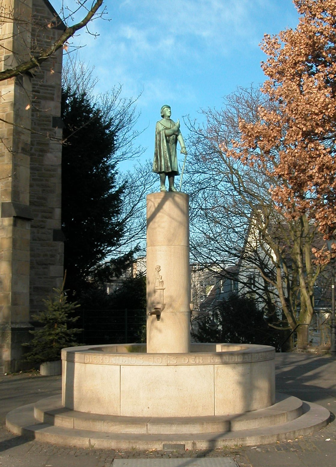 Hieronimus Jobs, der Kandidat Kamera-Position: 51°25′35.77″N 6°53′1.44″E / 51.4266028°N 6.8837333°EKirchenhügel Objekt: [1]